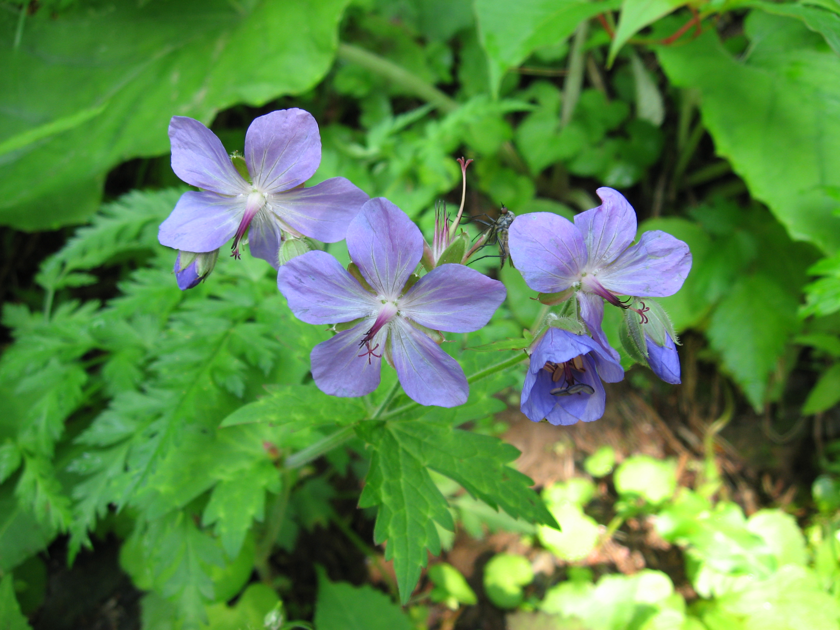 タカネグンナイフウロ (学名:Geranium eriostemon var. reinii f. onoei)